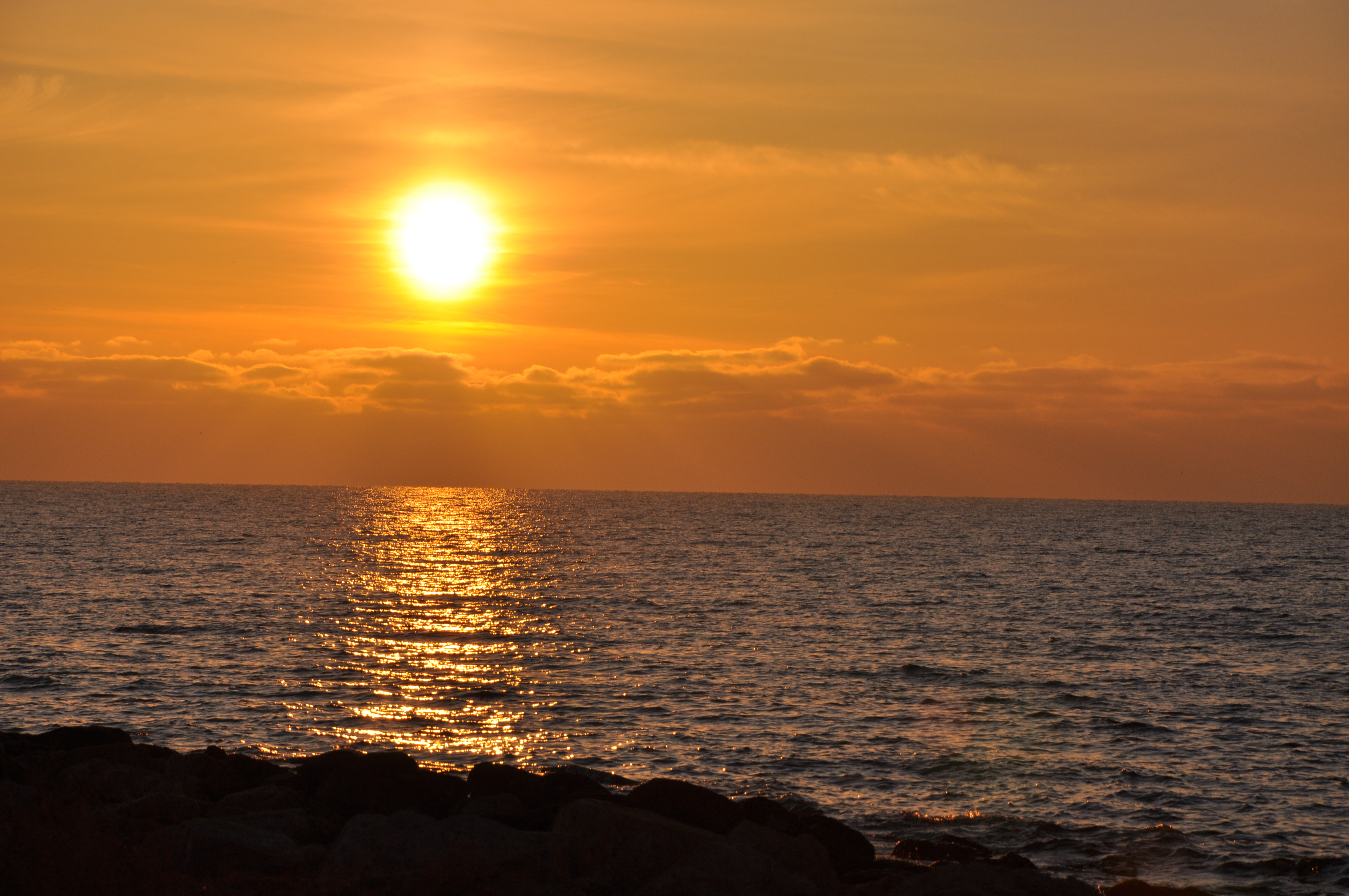 Каспийское море, Актау, Казахстан.